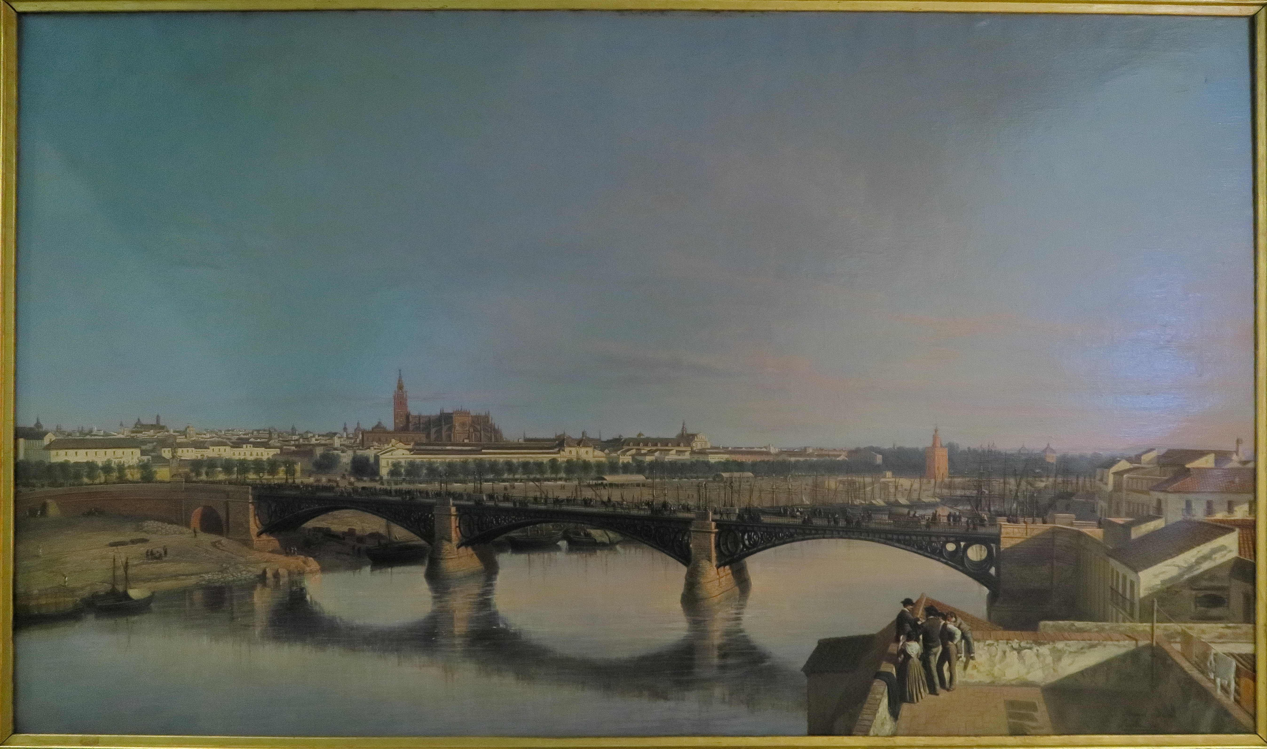 Vista desde de Sevilla con el puente de Triana. Manuel Barrón (1862). Óleo sobre lienzo. Colecciones reales. Patrimonio Nacional.